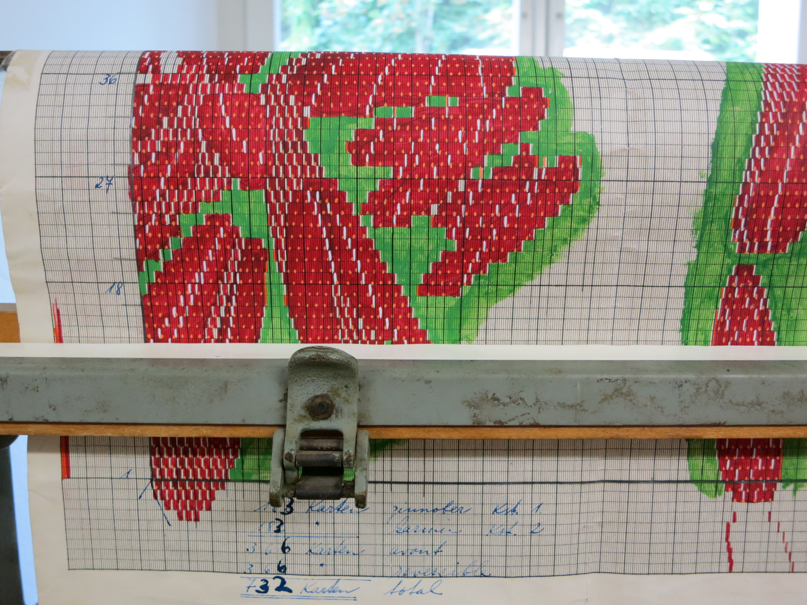 Bindungspatrone auf Kartenschlagmaschine, Museum Industriekultur Neuthal, Bäretswil ZH, Schweiz